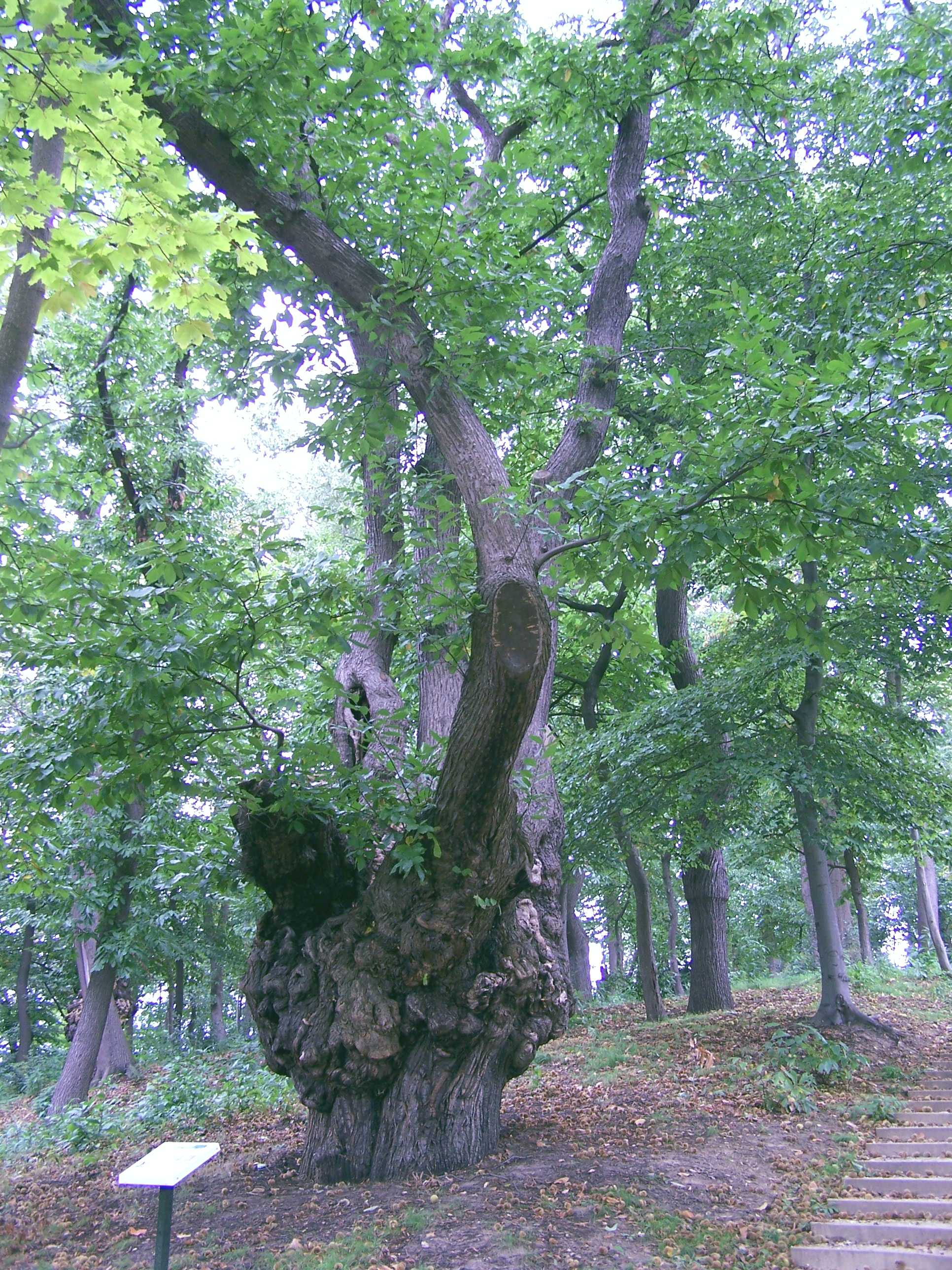 Tronc de châtaignier de Tournebride à la Celle-Saint-Cloud (Yvelines, France)